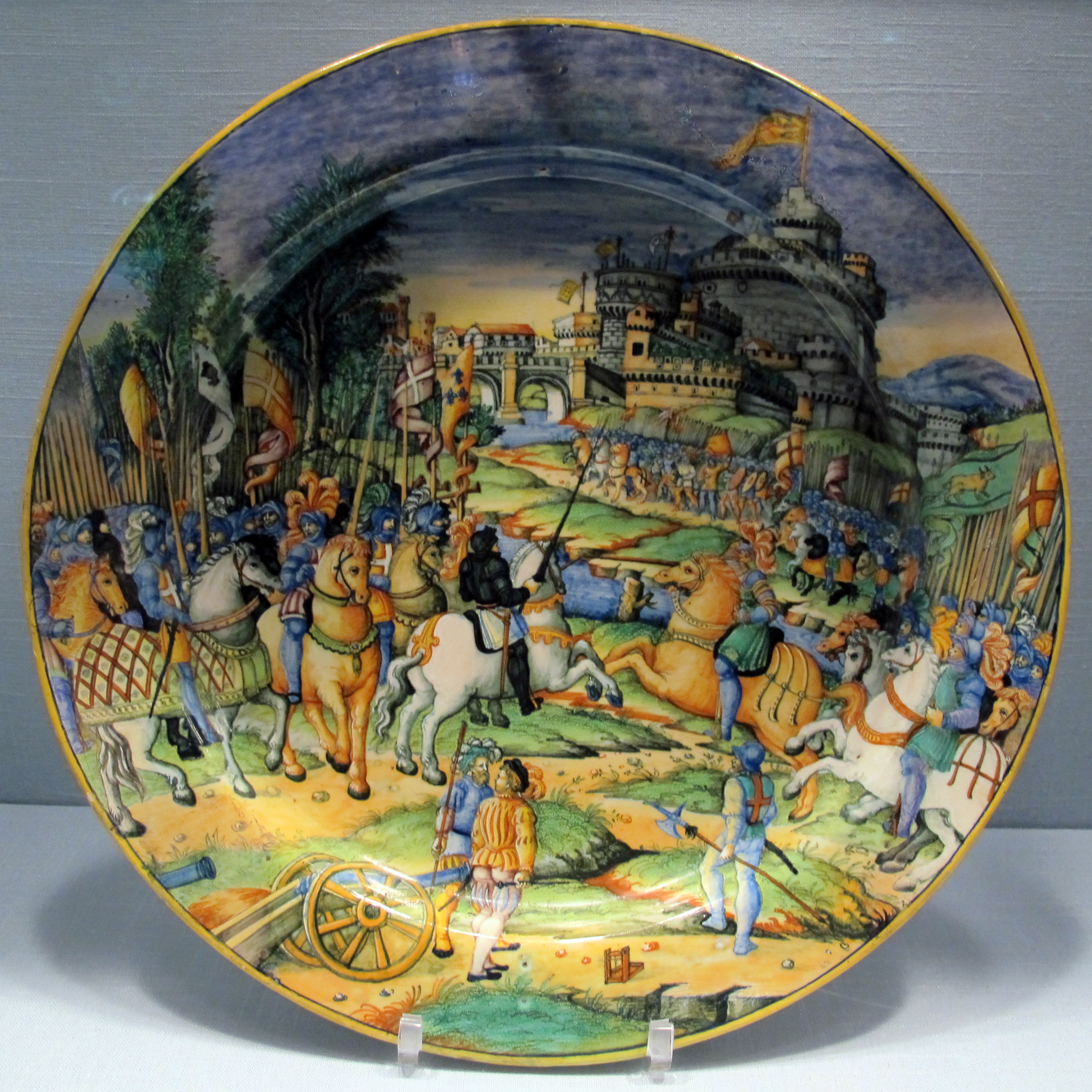 Objects d'art nel Metropolitan Museum of Art